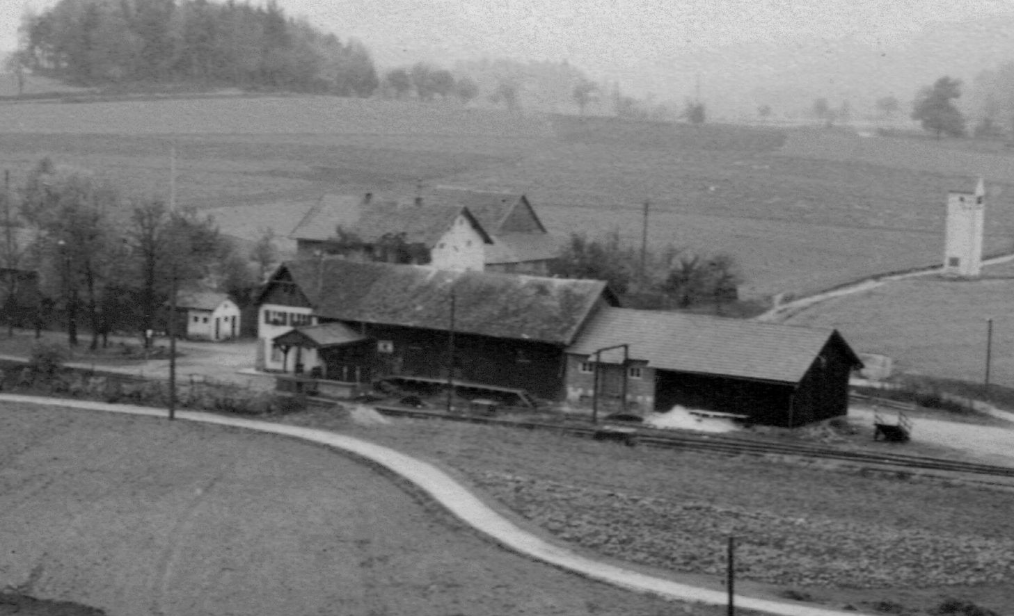 Bahnhof Gfäll - Nordseite